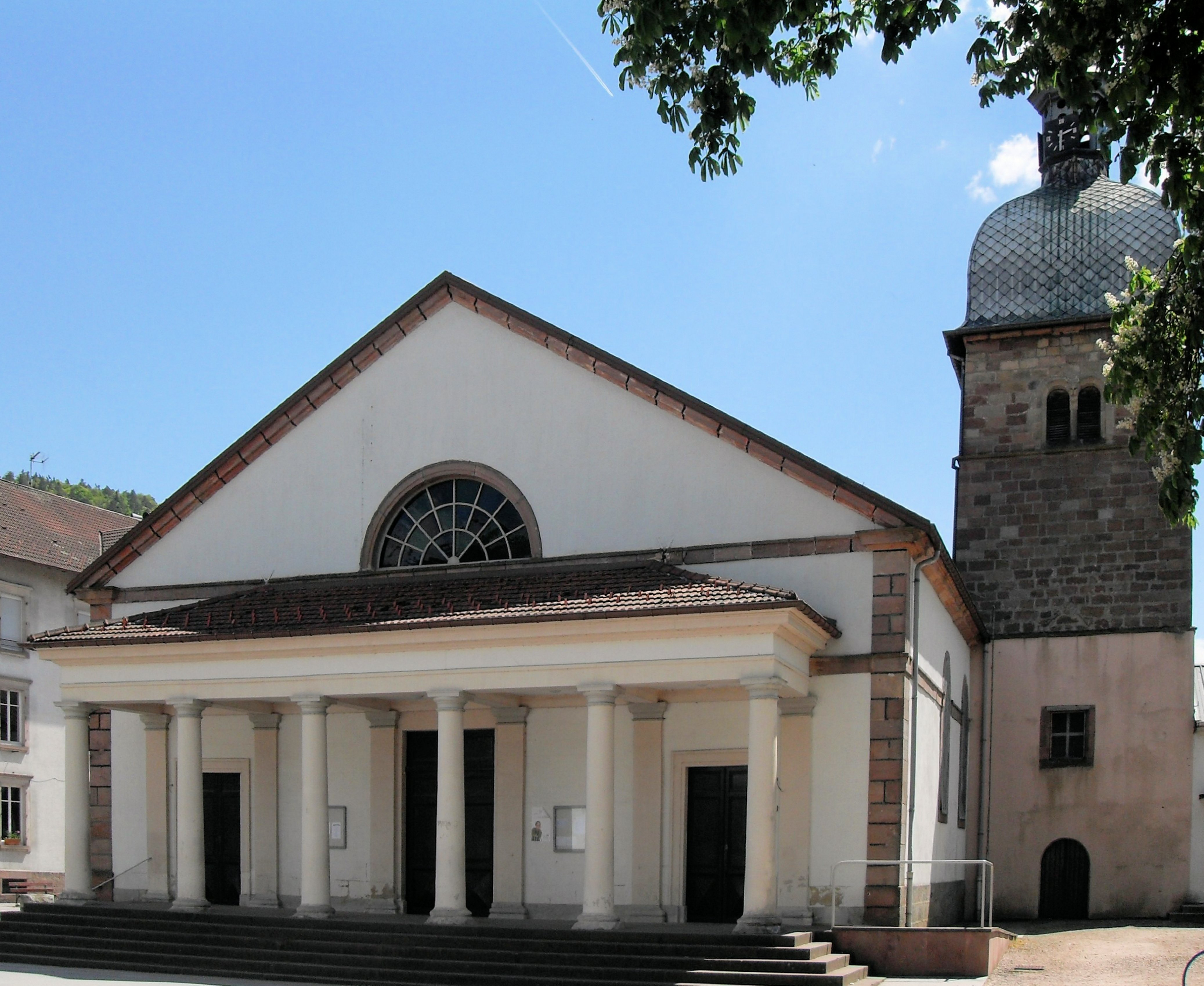 L'église de l’Assomption de Notre-Dame à Éloyes